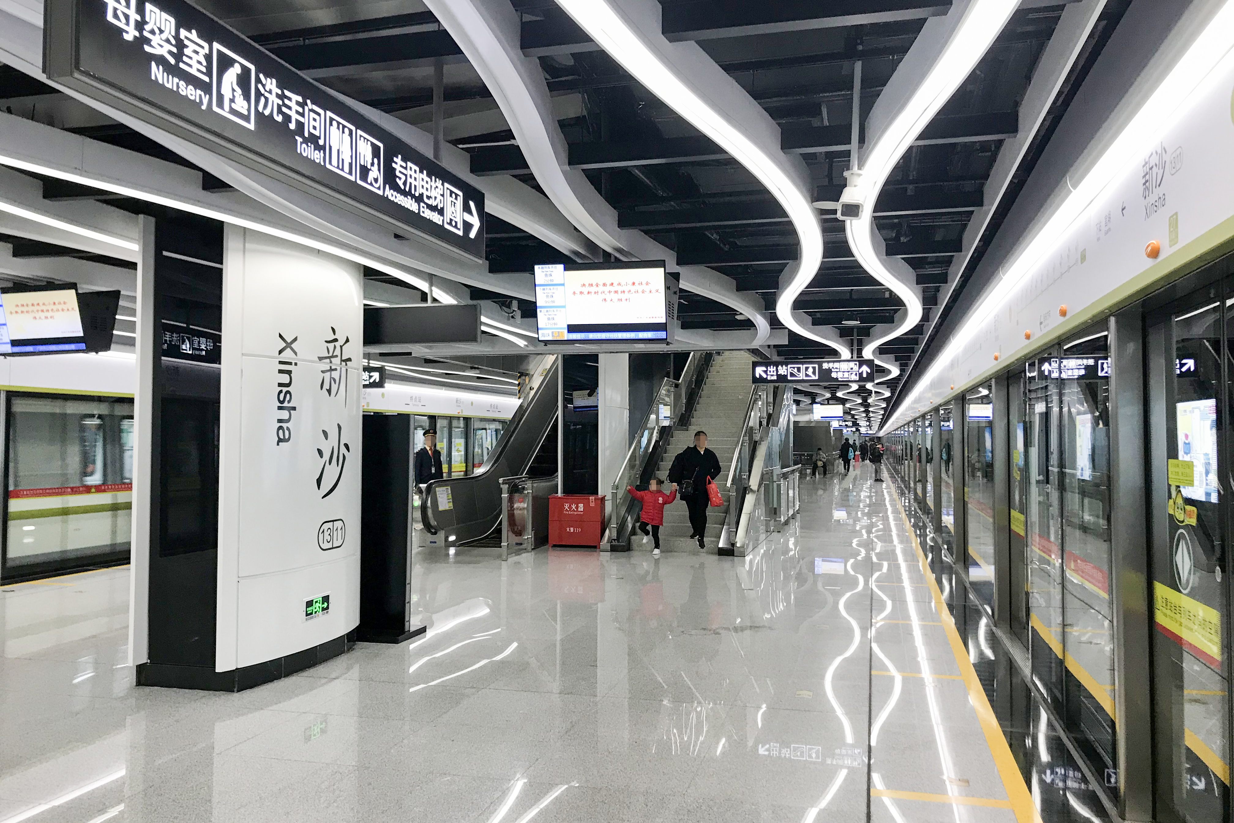 广州地铁新沙站